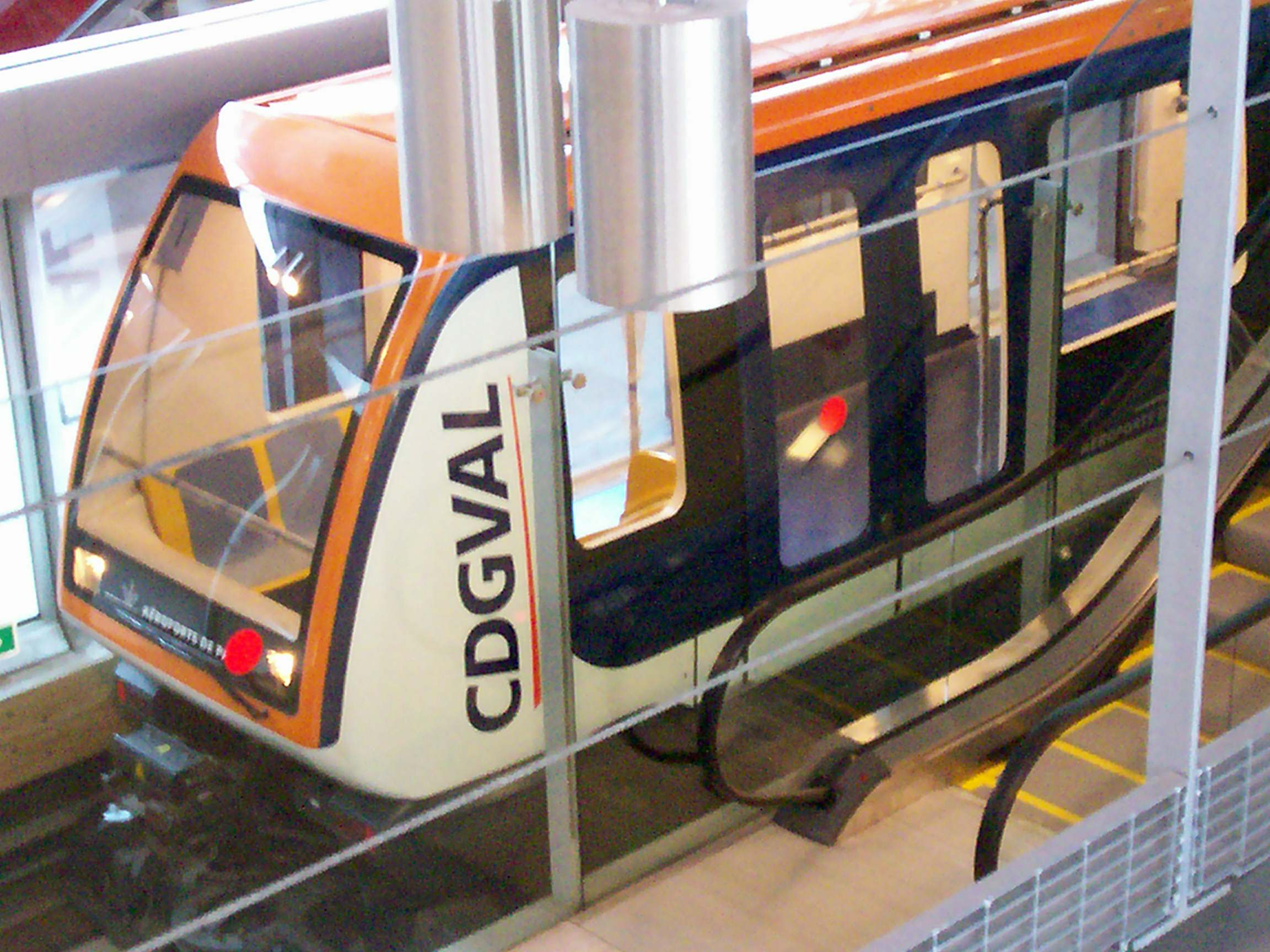 Rame VAL 208 NG en marche à blanc à la station "Terminal 3 - Roissypôle" (vers le Terminal 1)